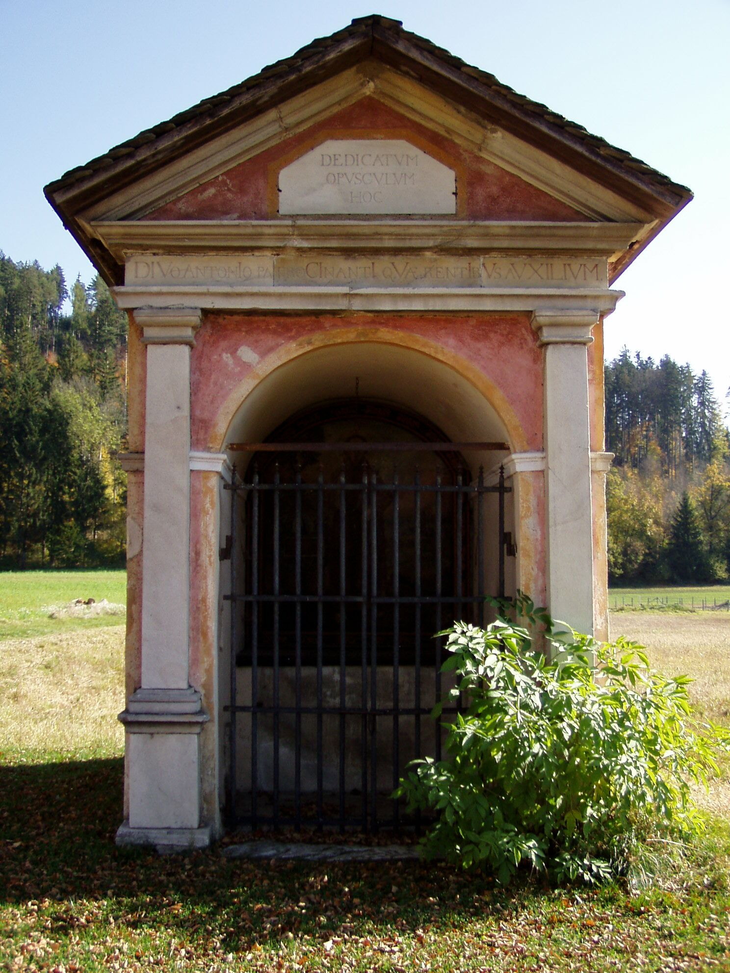 Prunnerkreuz, Zollfeld, Kärnten/Carinthia